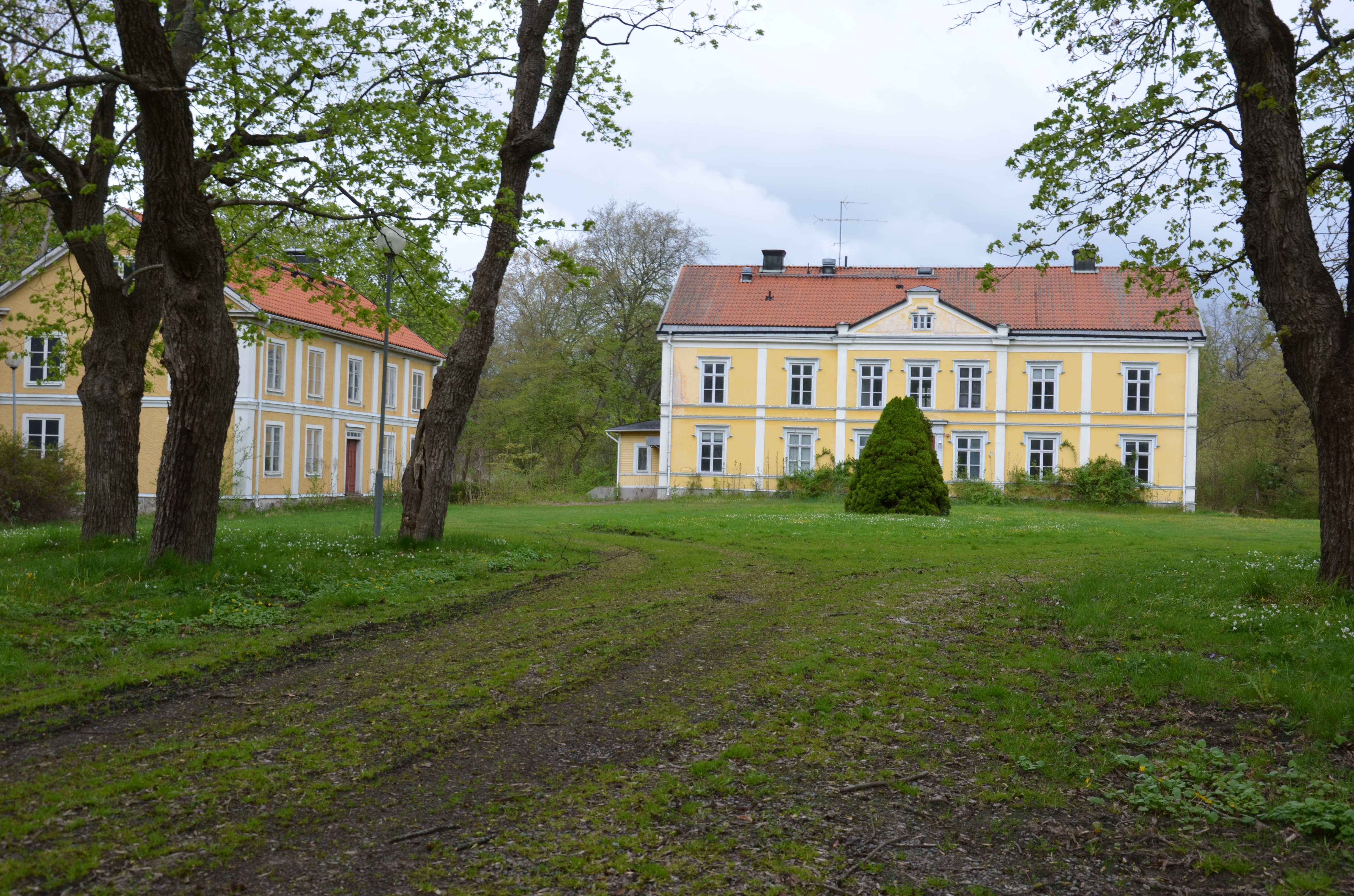 Händelö gård in Norrköping